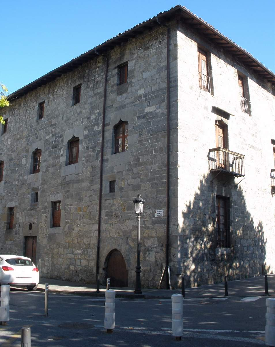 Azkoitia (Gipuzkoa) - Palacio Iribe